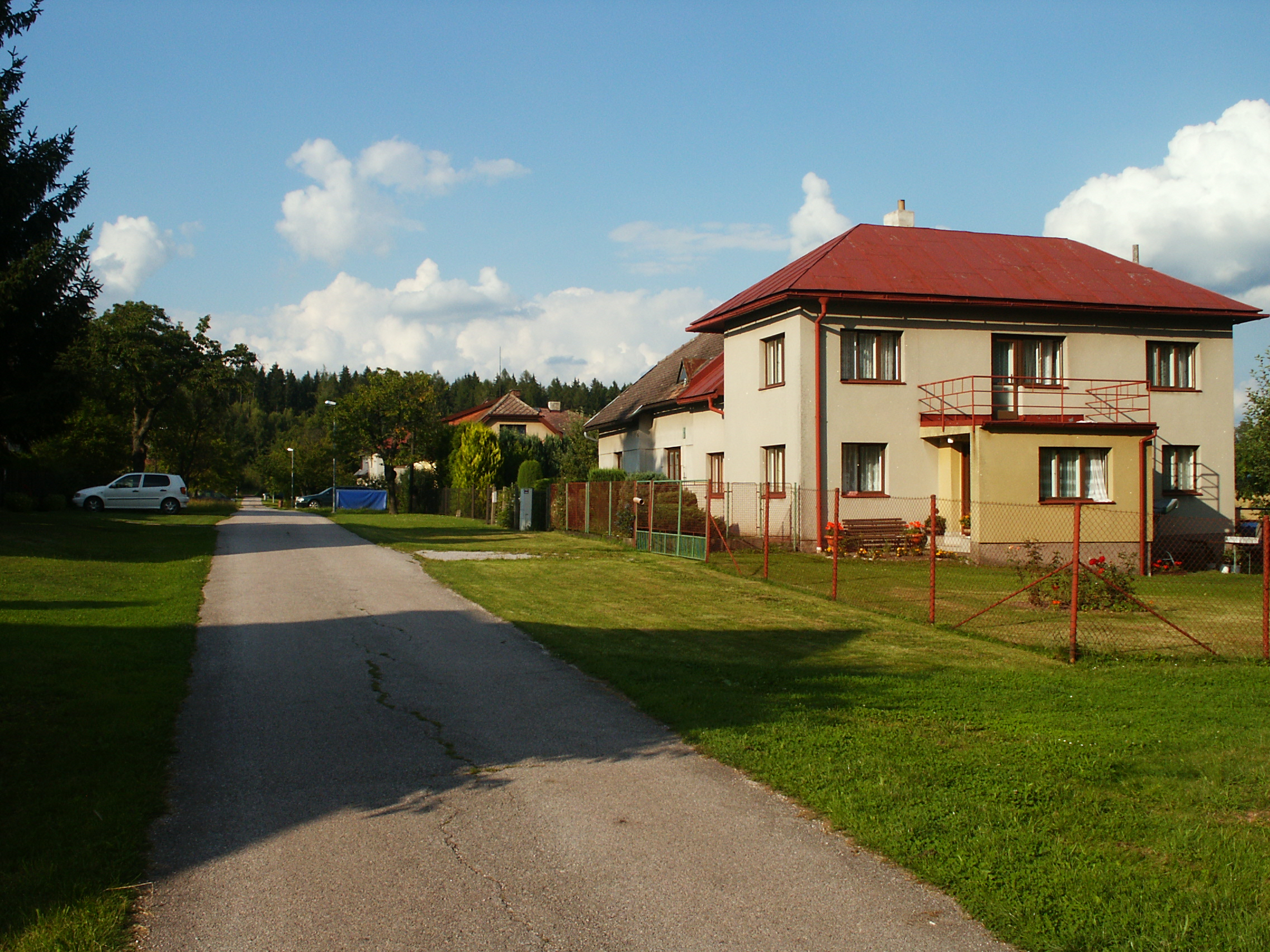 Rovnáčov - střední část obce